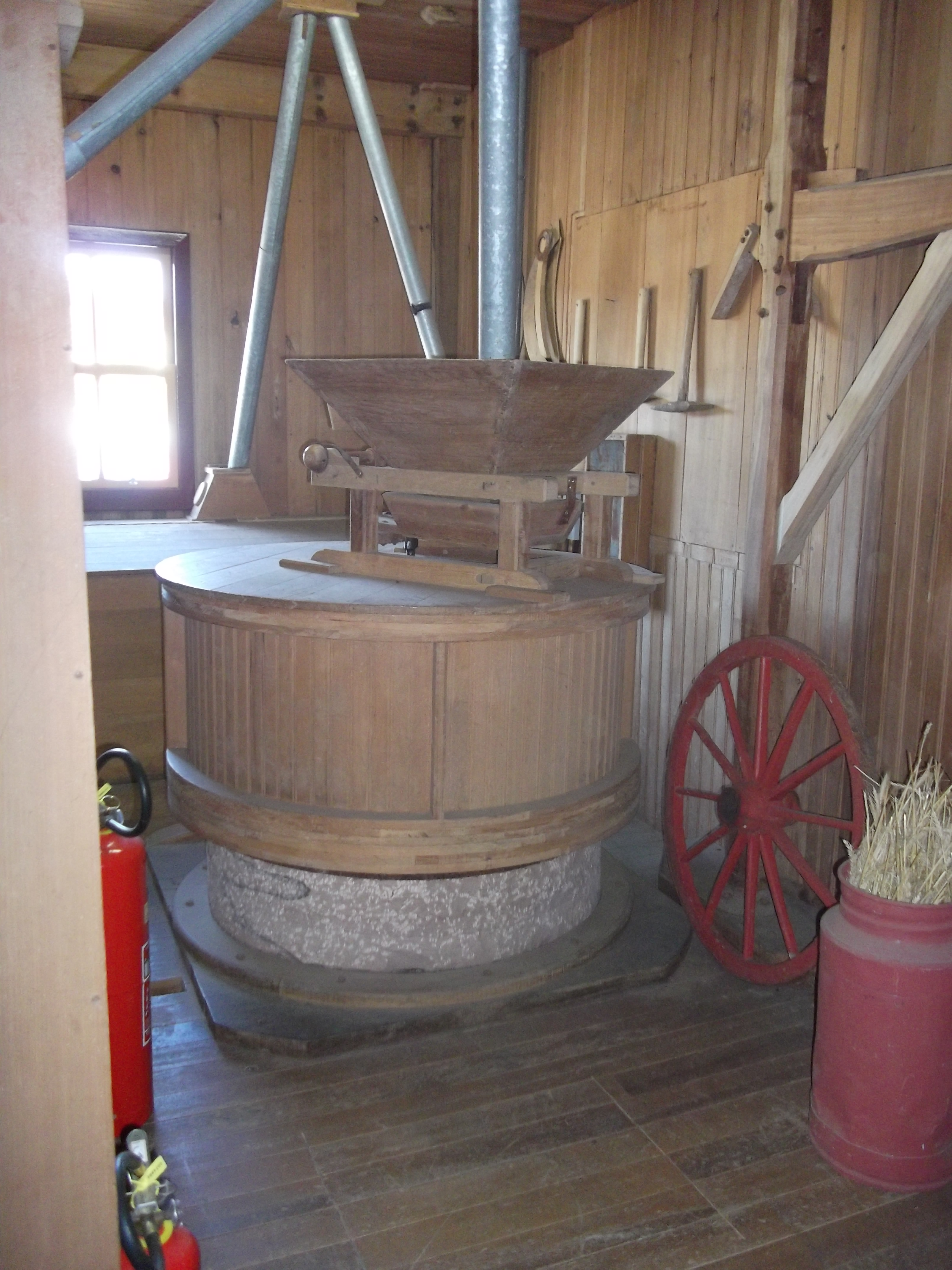 Moinho Rasche, Nova Petrópolis, Brasil : Pedra mó